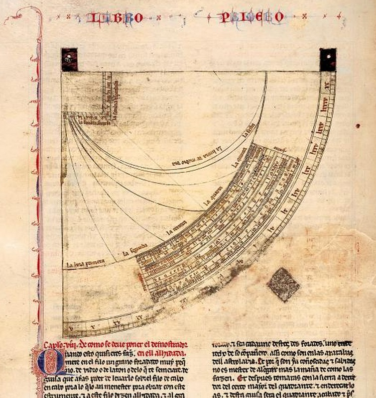 Afbeelding Quadrant uit de Libros del saber de astronomía